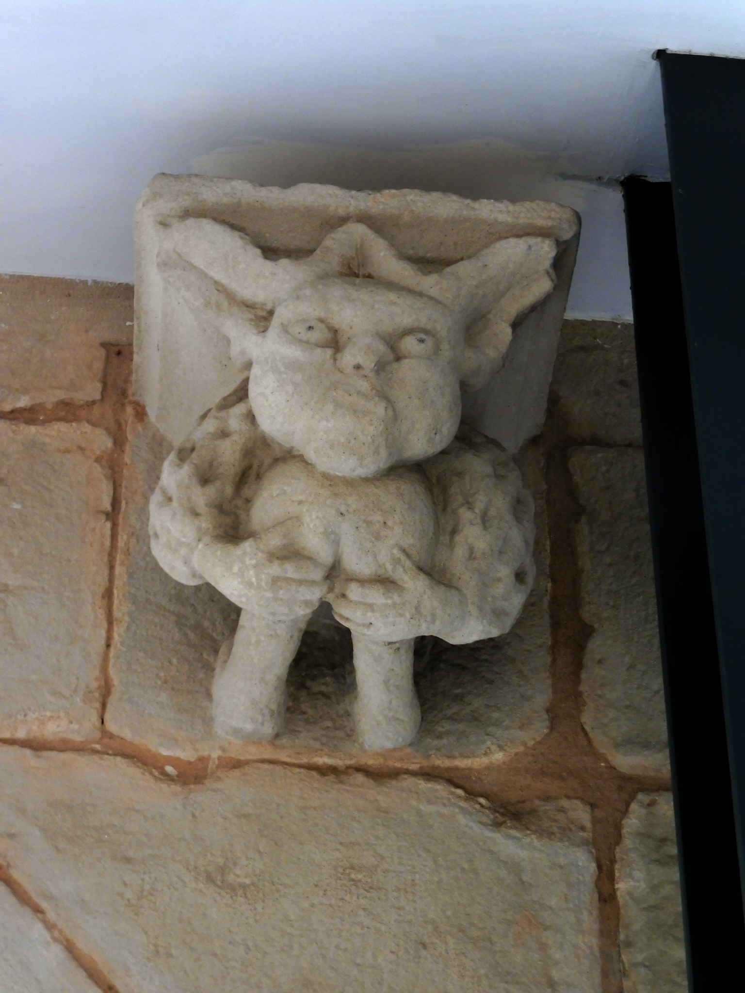 Habitatge a la plaça de Sant Roc, 39 (Bellpuig): mènsula